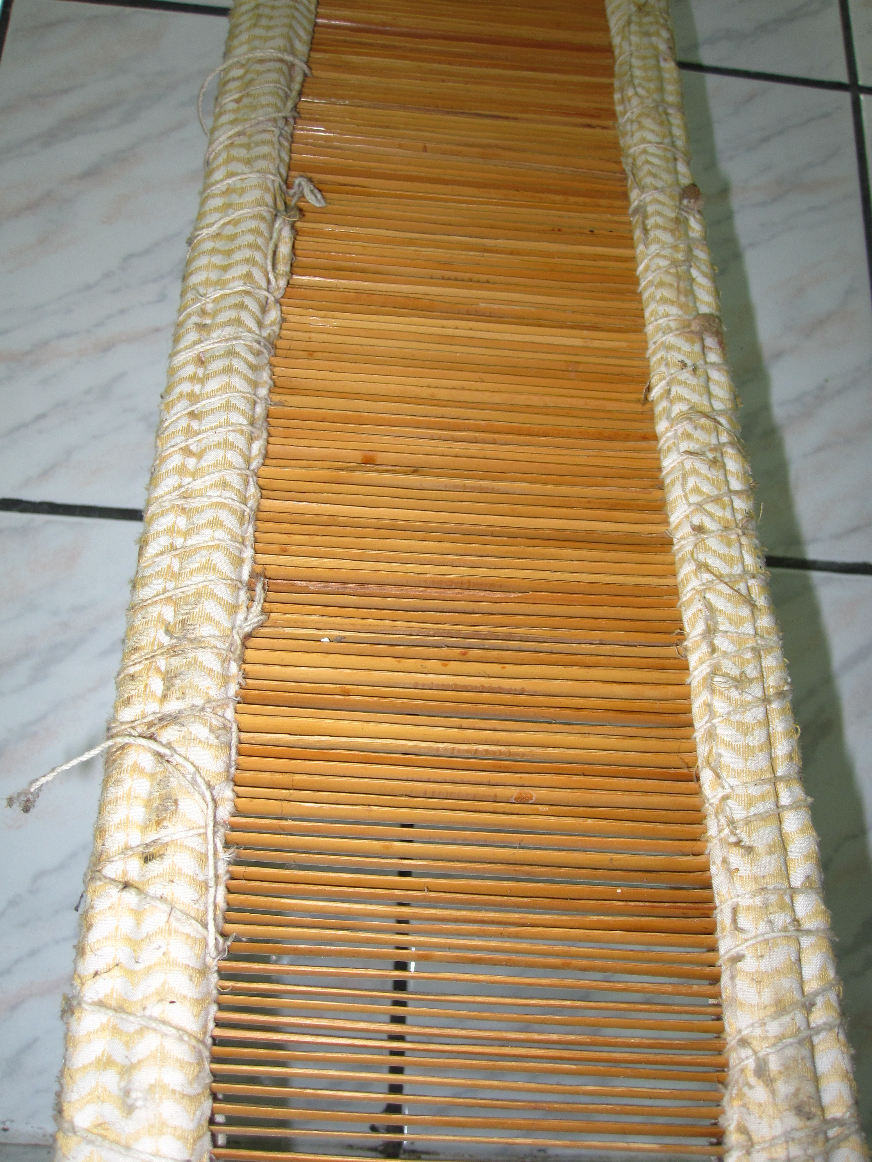 Брдо претставува дрвен предмет (две дрвени прачки поврзани со повеќе стапчиња од трска наредени едно до друго, низ кои поминувале конците) и е составен дел на разбој за ткаење.